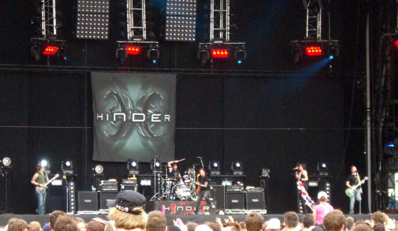 Hinder at Rock im Park 2007